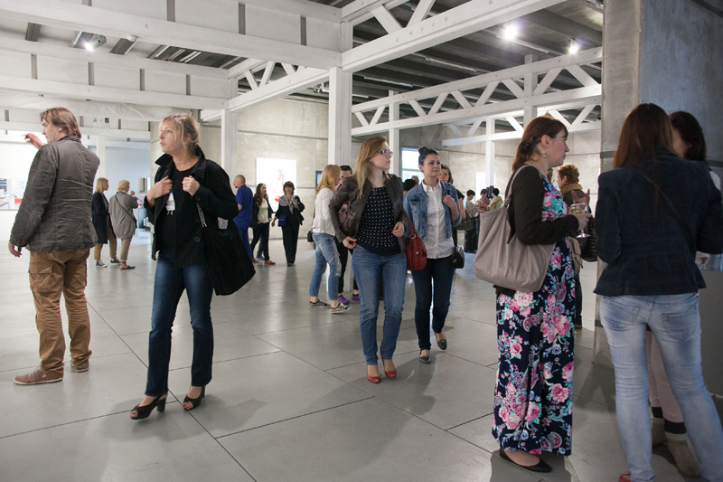 Выставка в Гридчинхолле